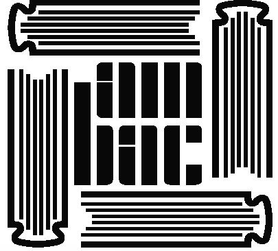 Logotipo de la AMBAC